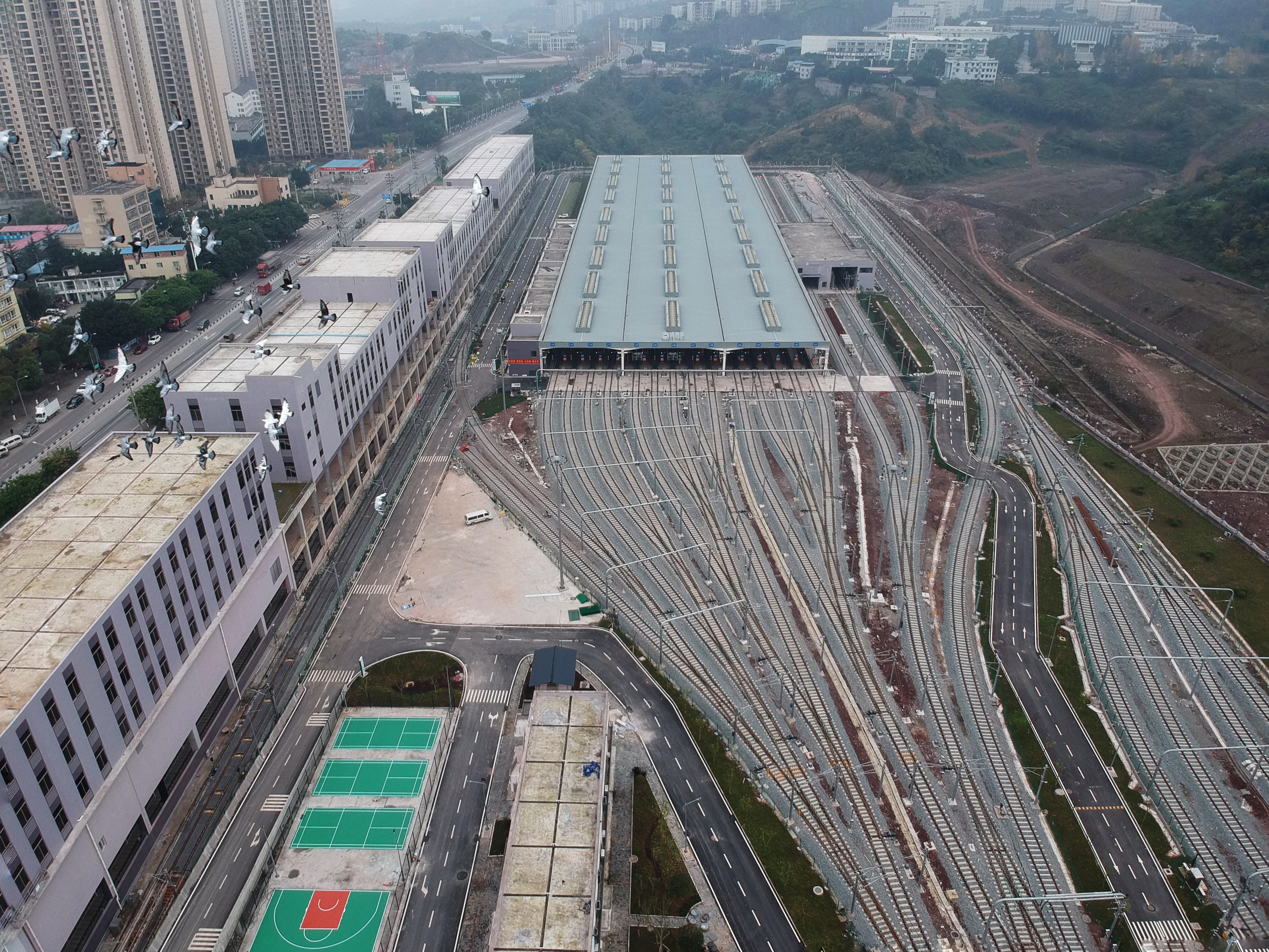 中文（中国大陆）: 4号线唐家沱车辆段